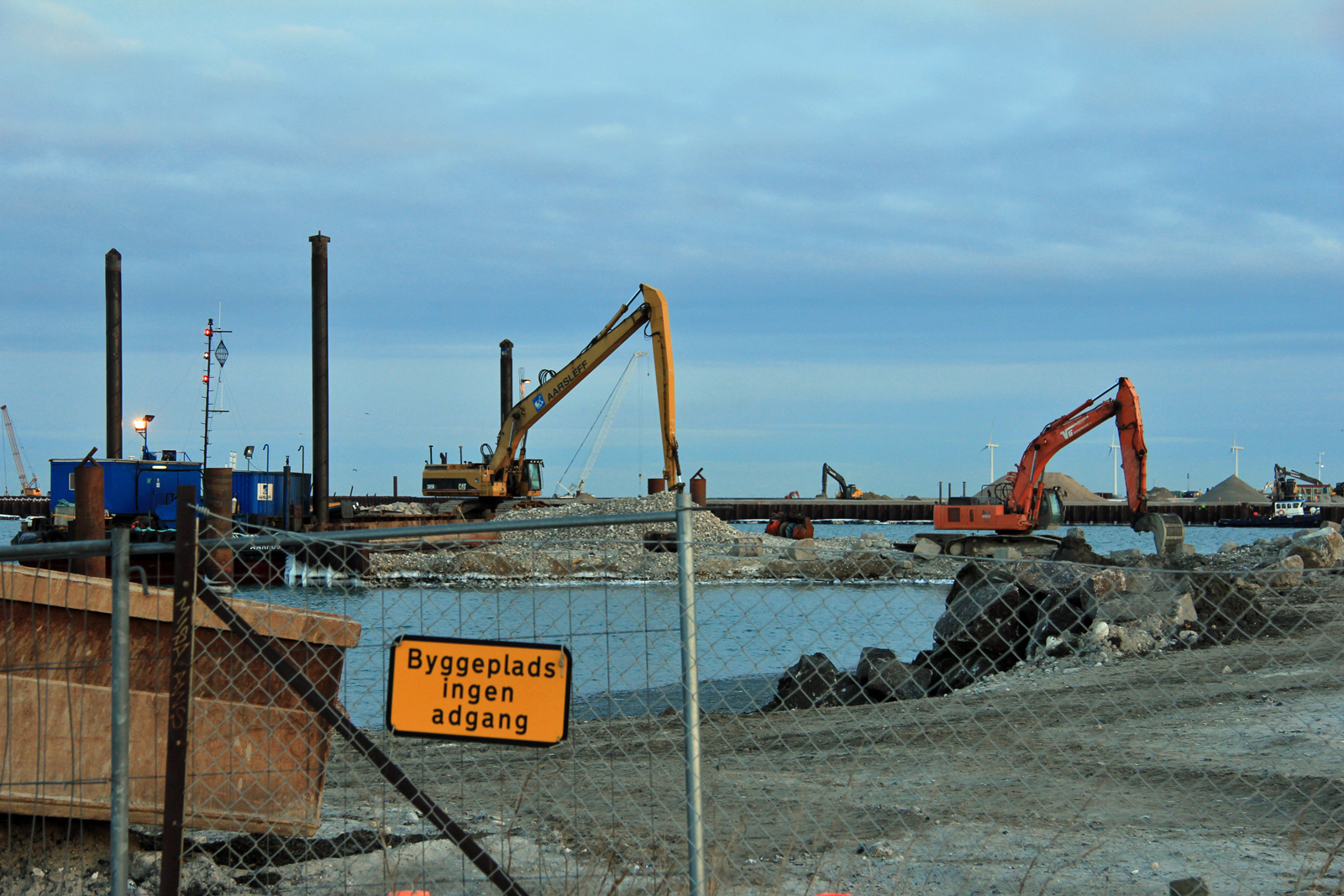 Nordhavnen udvides med 100 ha. ved en større opfyldning